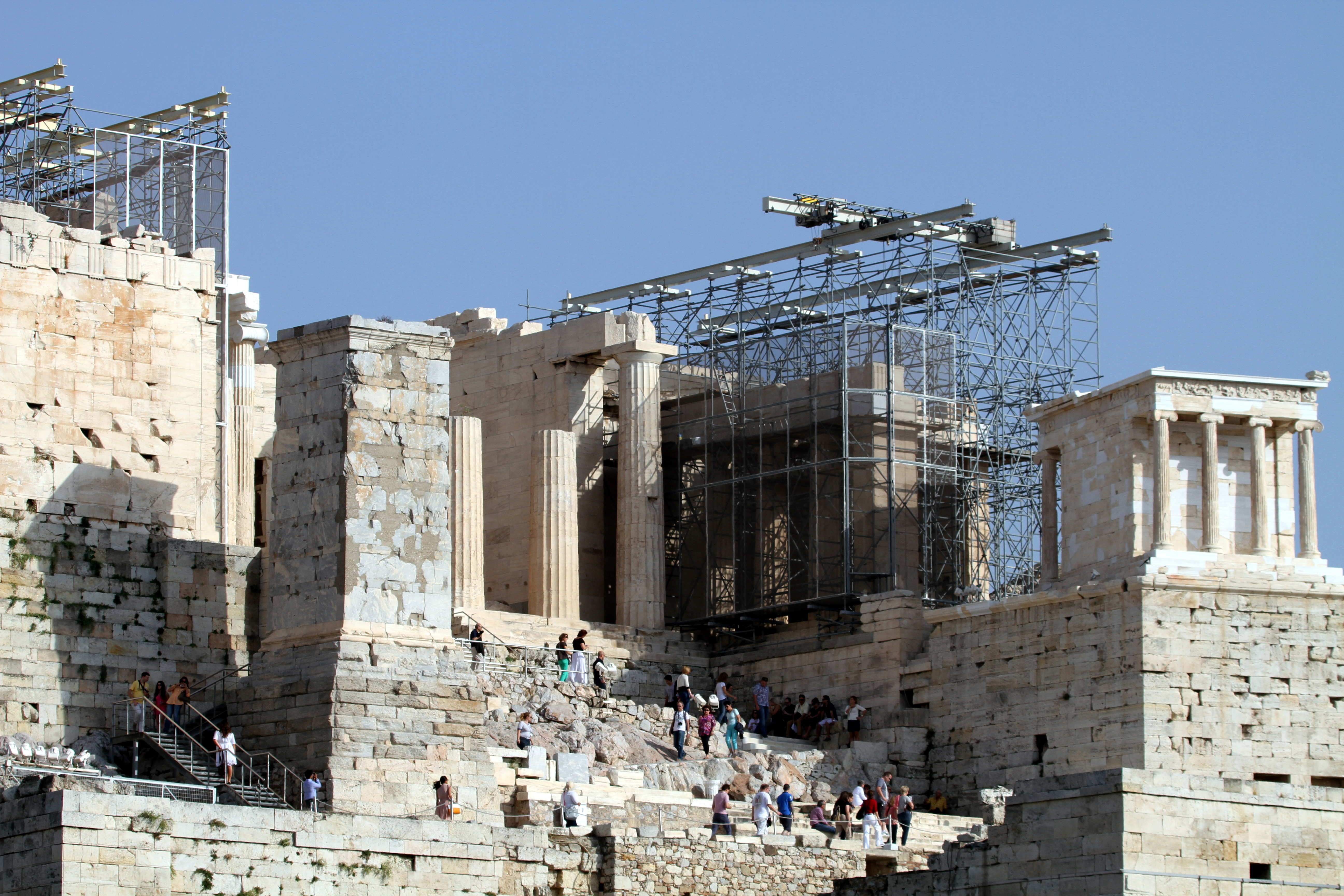 Acropolis